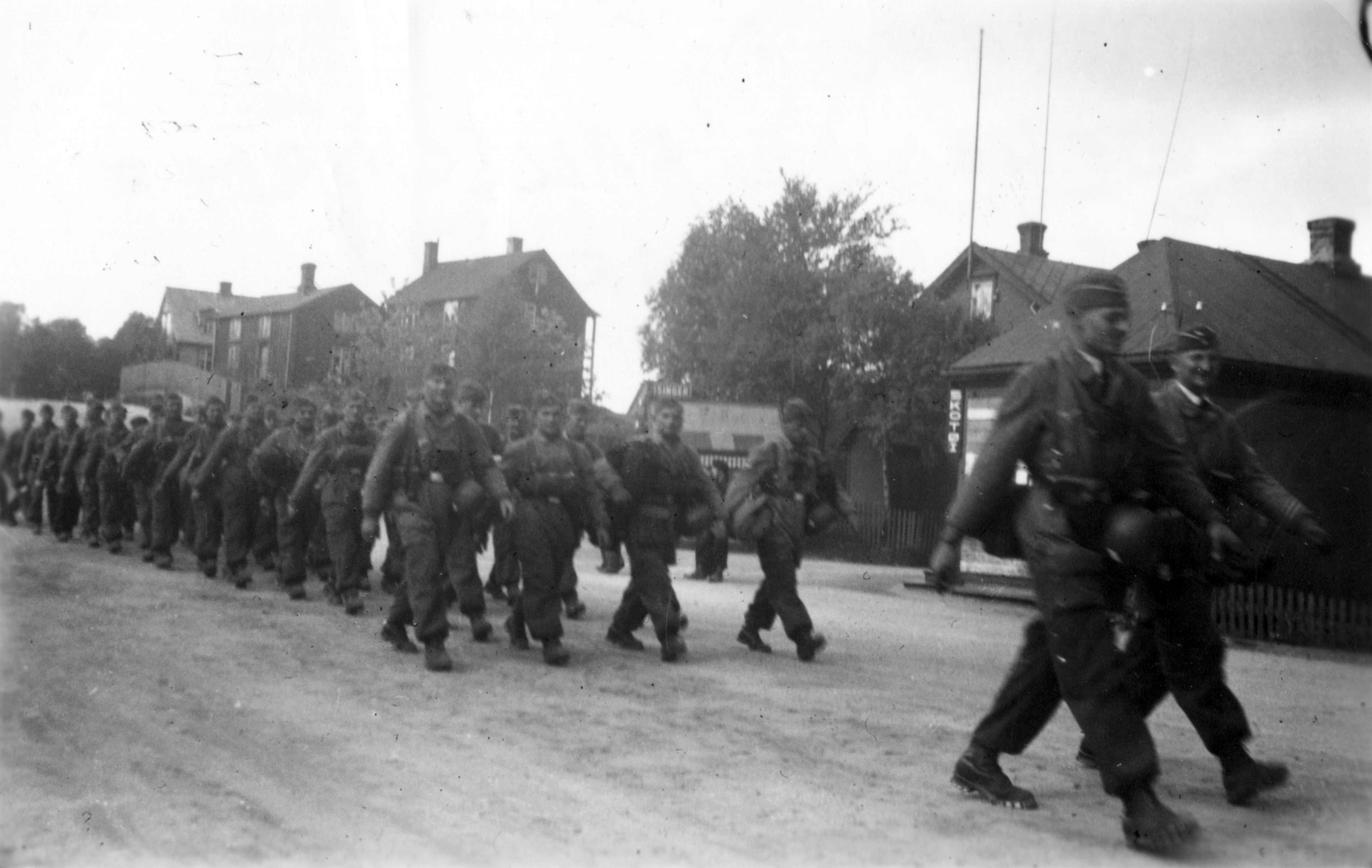 Fallskjermjegere i Narvik 1940 Tittel / Title: Fallskjermjegere i Narvik Dato / Date: 21.06.1940 Fotograf / Photographer: Franz Hollerweger/Kepplinger Sted / Place: Narvik, Nordland, Norge Eier / Owner Institution: Arkiv i Nordland Lenke / Link: Arkiv i Nordland Arkivreferanse /Archive reference: AIN.NA143.0067 En tropp fallskjermjegere marsjerer i triumf inn i Narvik etter kampene i fjellene rundt om. Kanskje ble dette bildet tatt allerede 9. eller 10. juni 1940. Soldatene triumferer tydelig mens de synger. (Skogheim) Fra Dag Skogheims Privatarkiv Tekst bak på bildet: 21.06.1940: Abziehende fallschirmjäger in Narvik.